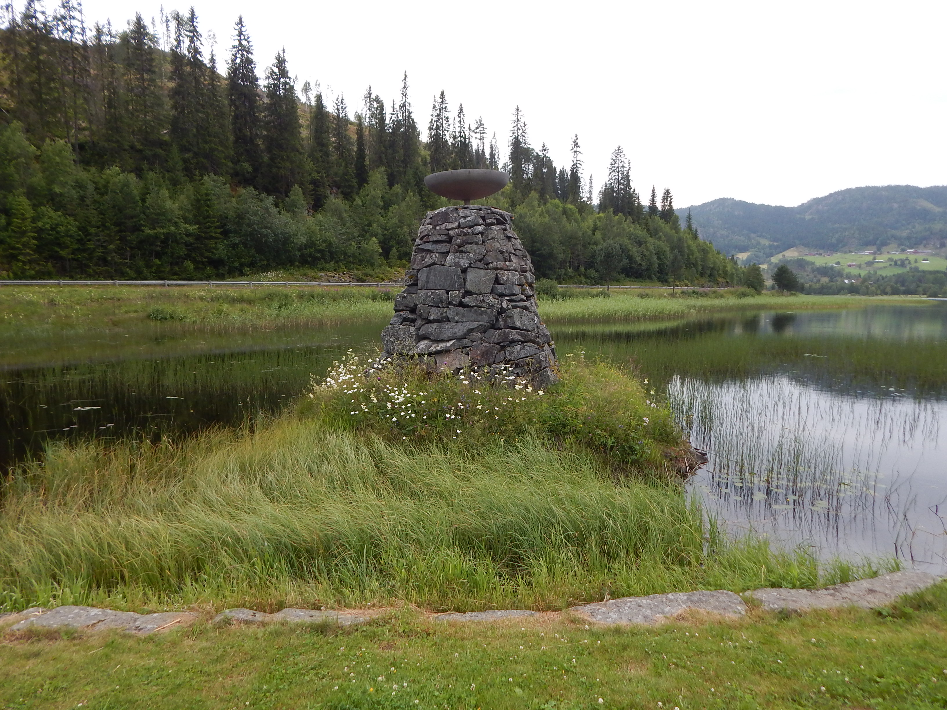 Stedet for tenningen av OL-ilden i Morgedal